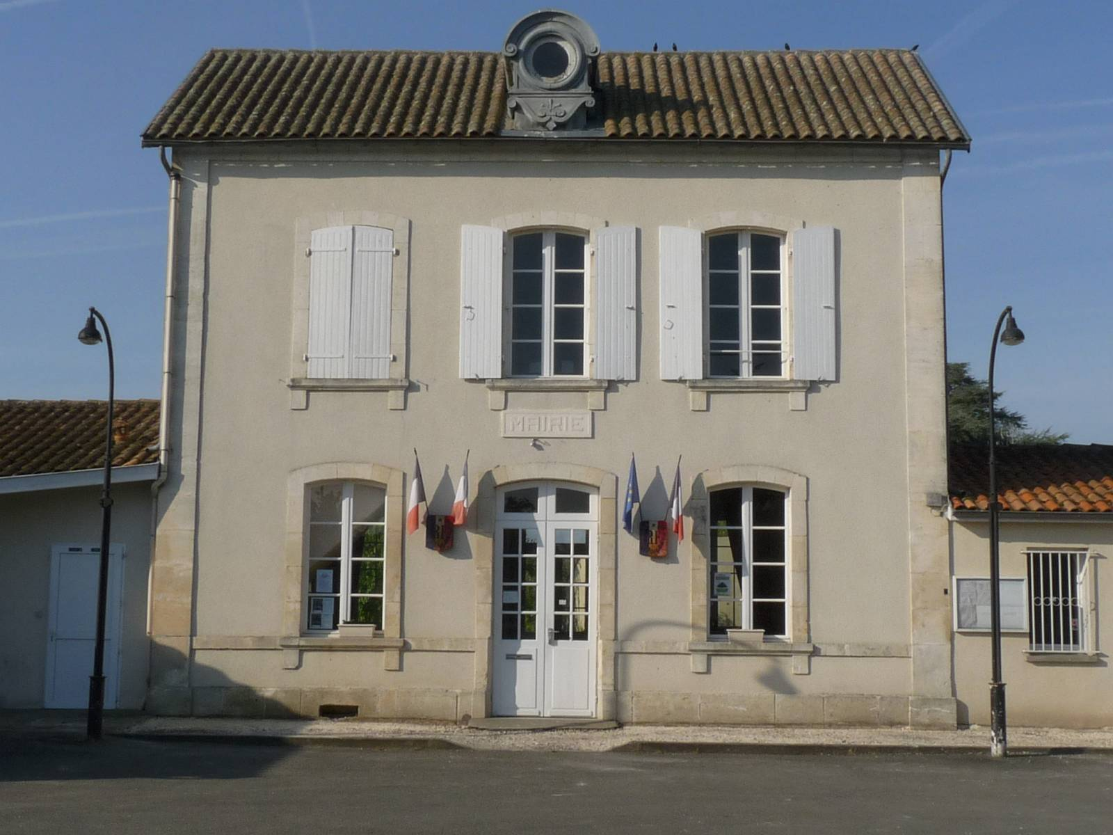 Mairie de Graves-St-Amant (ancienne gare), Charente, France